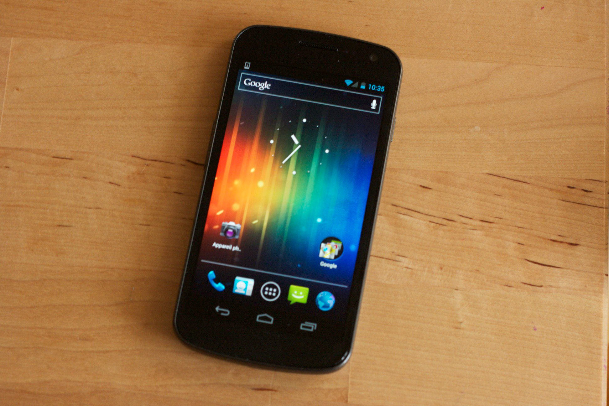 Photo mettant en scène le Galaxy Nexus, produit par Samsung.